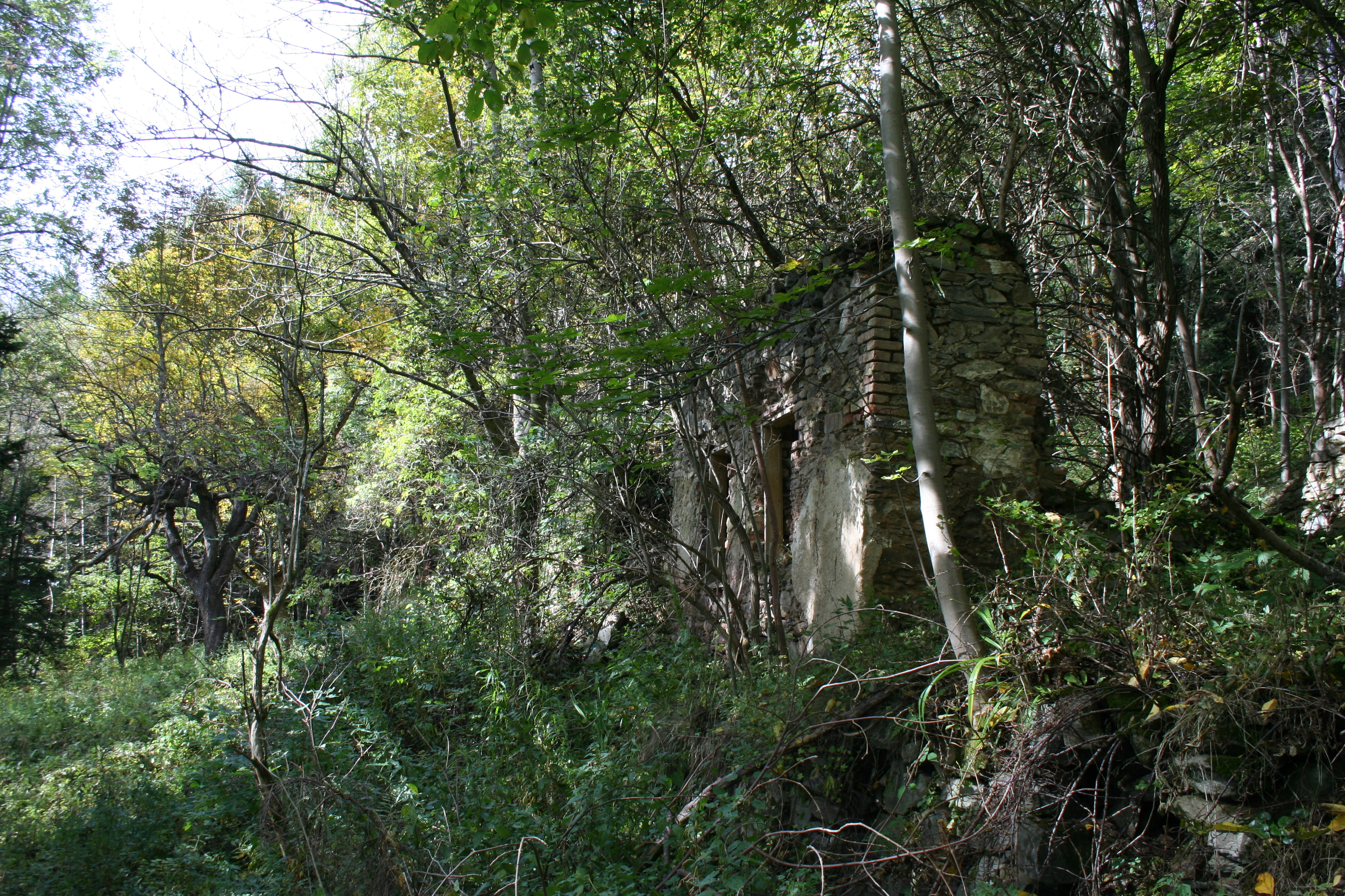 Ruiny domů v bývalé vesnici Ždánov